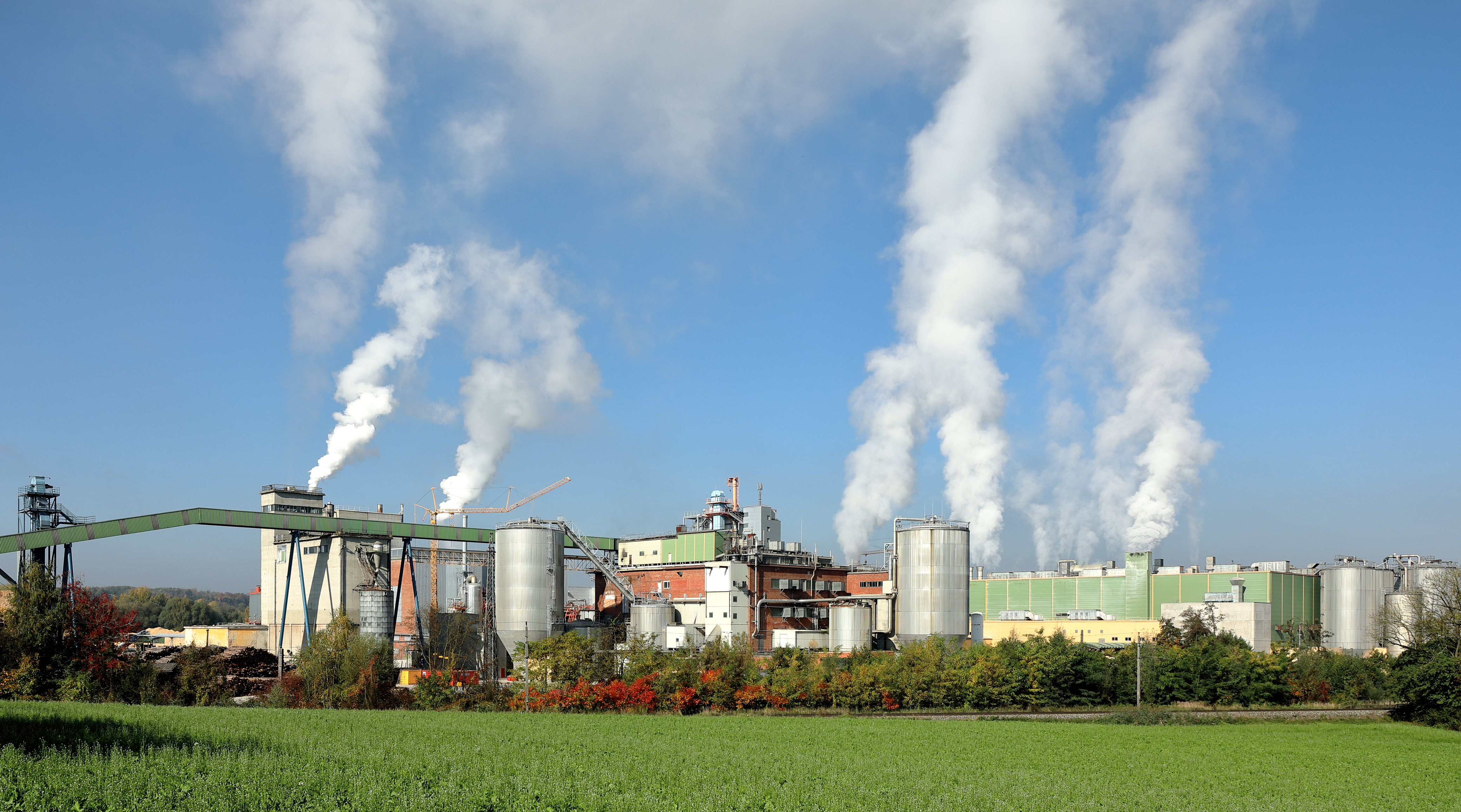 Südostansicht der Nettingsdorfer Papierfabrik in der oberösterreichischen Stadtgemeinde Ansfelden. Die Ursprünge der Papierfabrik gehen bis 1851 zurück. Aktuell (2017) ist es ein Unternehmen der Smurfit Kappa Group mit rd. 350 Mitarbeitern.